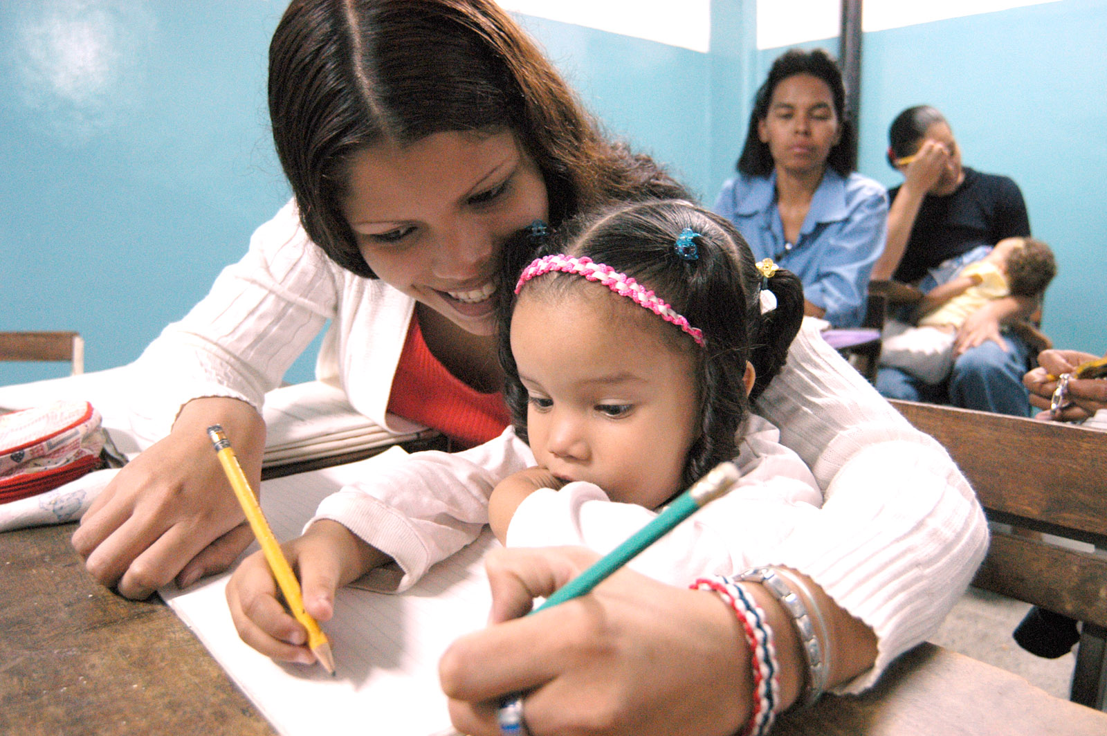 Plan Piloto-Misión Ribas, "¡Hazte Bachiller!". Deysi Cedeño de 22 años asiste a sus clases con su niña Dreismar de 3 anos. En a la nina hacer figuras geométricas. Lugar: Parroquia San Agustin del Sur, Caracas Venezuela. En Cuba las parroquias es el Consejo Popular. Fecha: 06 de Febrero de 2004